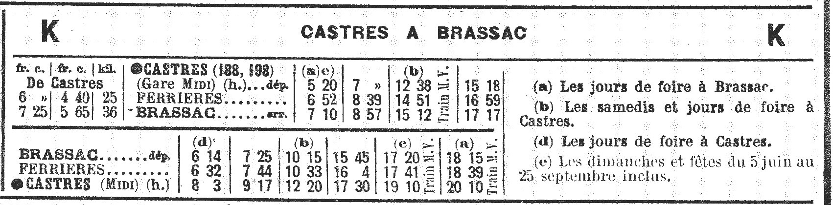 Horaires CFDT - été 1933